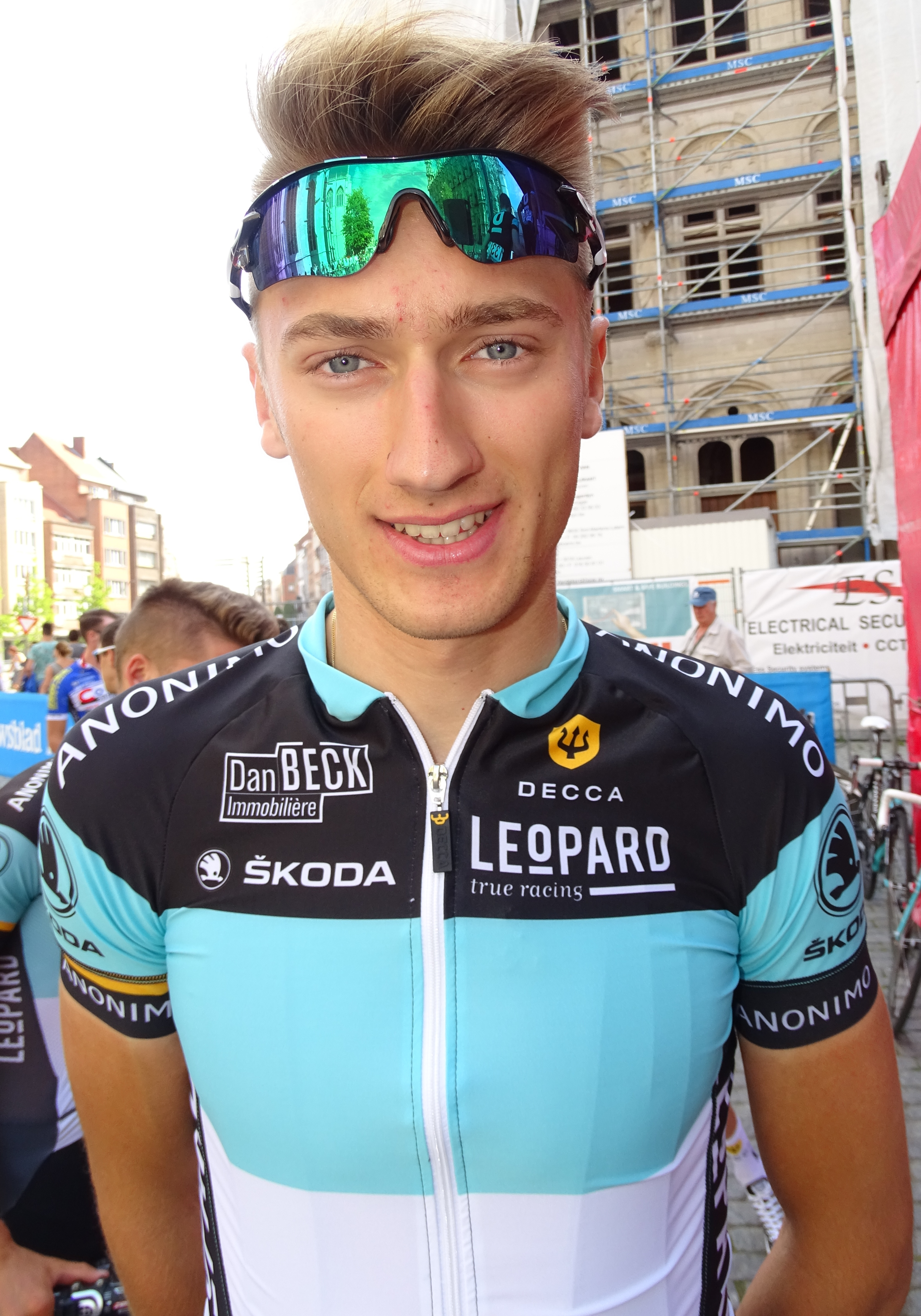 Reportage réalisé le dimanche 23 août à l'occasion du départ et de l'arrivée du Grand Prix Jef Scherens 2015 à Louvain, Belgique.